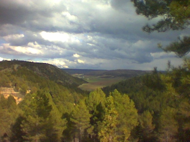 Imagen del pinar y al fonda la Vega de Arias, entre los terminos municipales de Fuembellida y Tierzo.